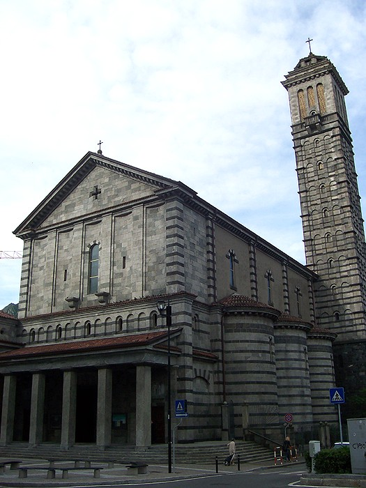 Lecco - Chiesa di S. Maria della Vittoria